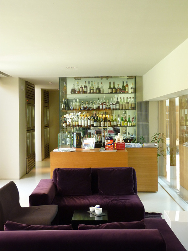 Sala per aperitiu o copa